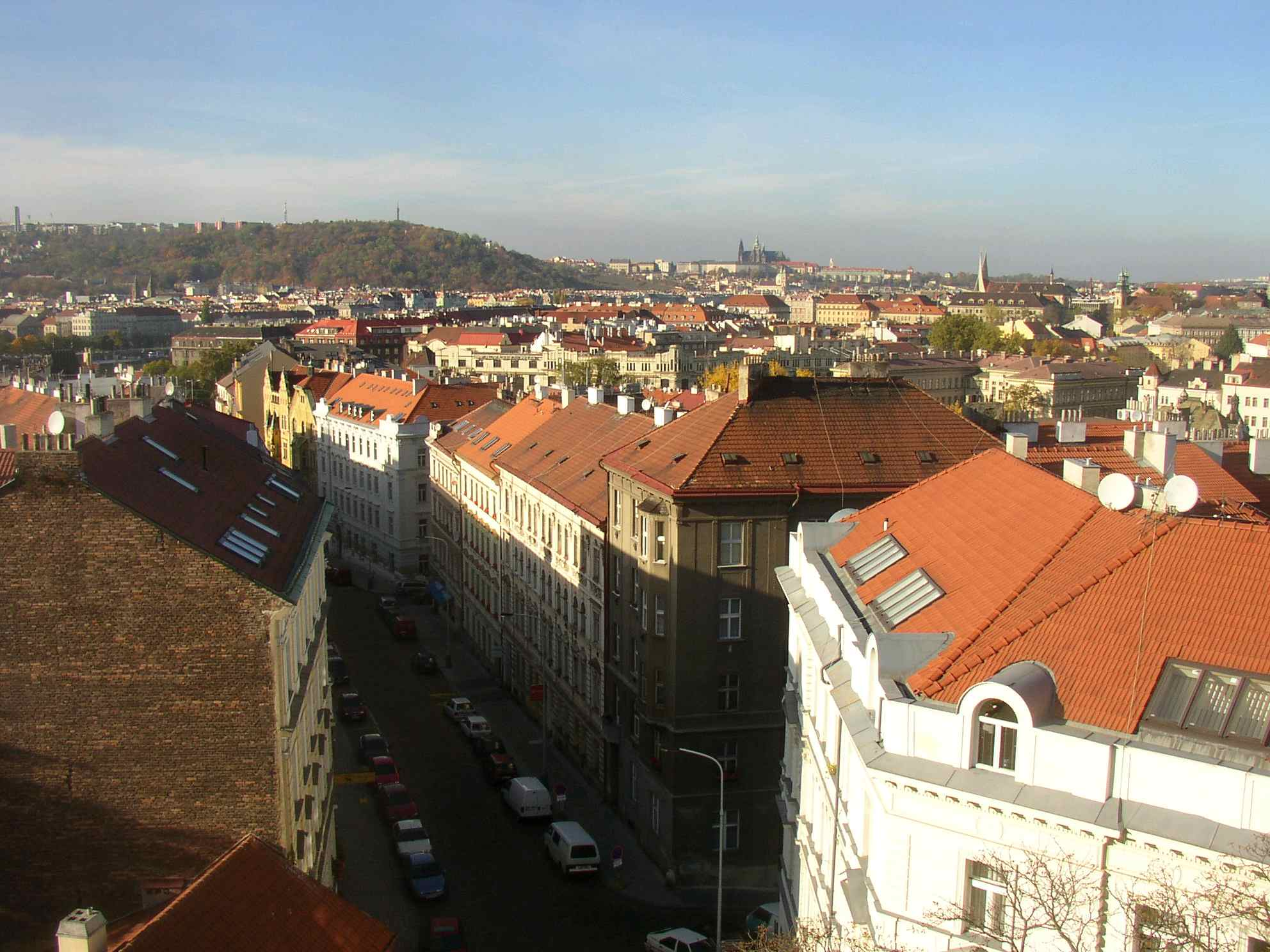 View from walls of Vyšehrad towards Prague Castle in Prague, Czech Republic The air distance between these two castles is slightly above 3 km. In the foreground is the lower part of the Vyšehrad district. In the background Smíchov district and Petřín-Strahov hill in the left and part of Nové Město district in the right. Pohled s vyšehradských hradeb směrem ku Pražskému hradu, vzdálenému vzdušnou čarou něco přes 3 km. Popředí snímku zaujímá vyšehradské podhradí s hlavní osou Vratislavovy ulice, v pozadí pak na levé straně pod petřínsko-strahovským návrším Smíchov, na straně pravé část Nového Města. Photo taken by Miaow Miaow in October 2005, PD-self